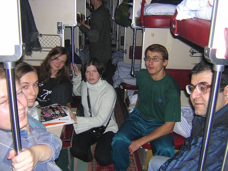 Eno de longdistanca vagono. Aŭtoro de la bildo estas Jekaterina Volkova. La bildo estas lokiĝita ĉi tie laŭ permeso de la aŭtoro. La fonta bildo de ĉi tiu bildo estis en retpaĝo de la aŭtoro [1] kiu nun ne funkcias.